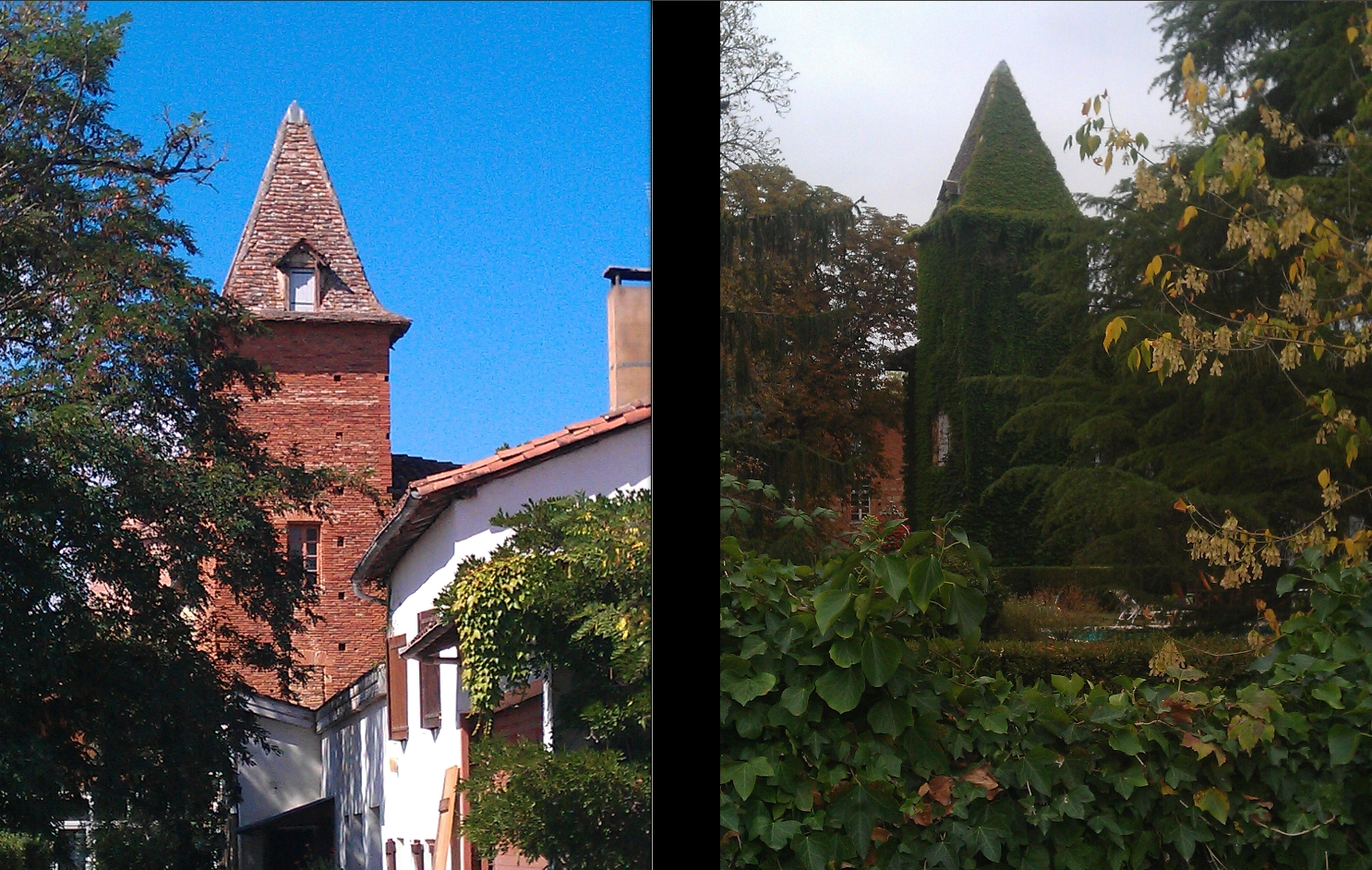 Photos des tours du Château du Travet (propriété privée), (Inscrit, 1952) .